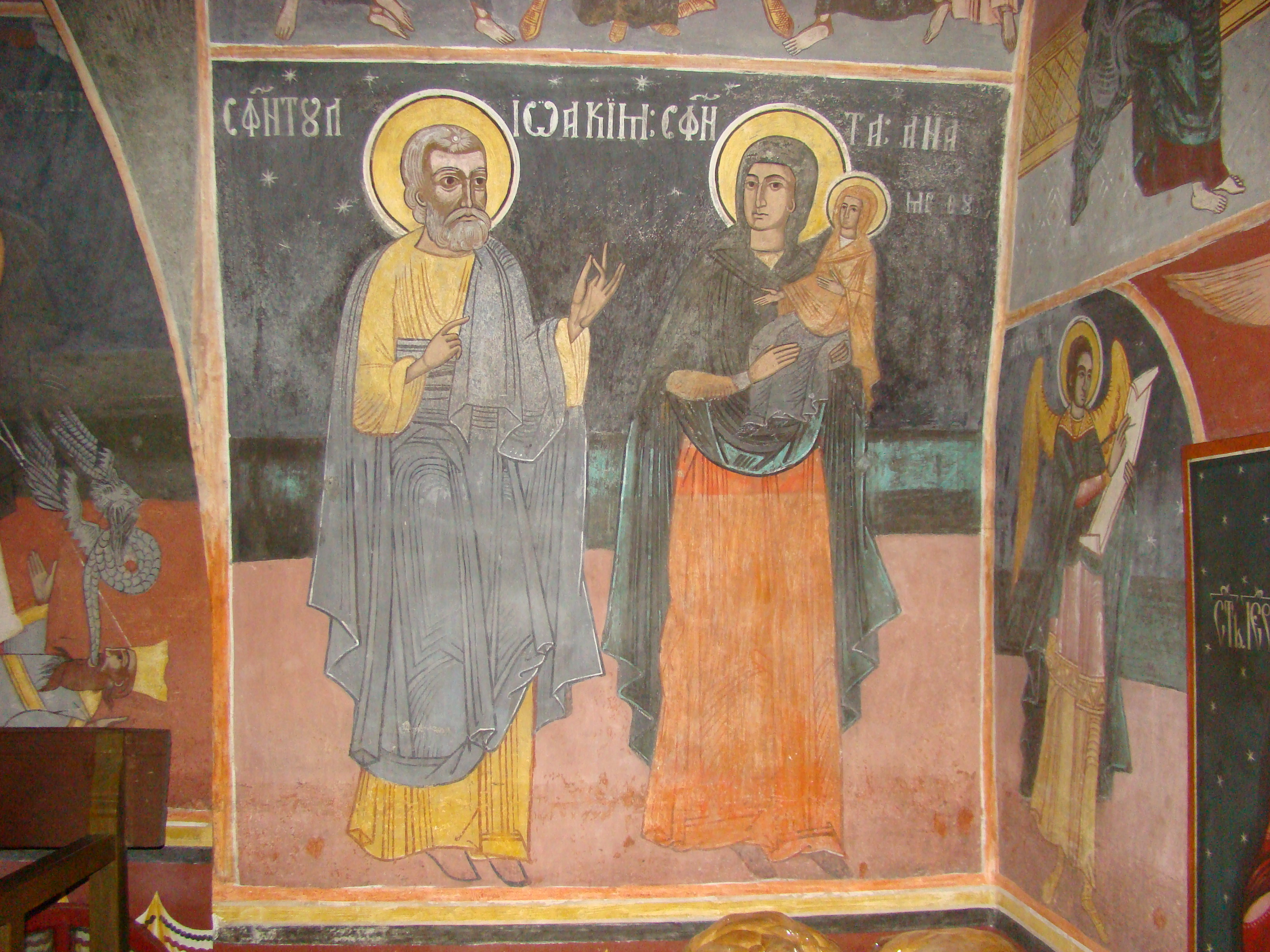 Biserica "Naşterea Domnului" , sat SĂRATA; comuna PORUMBACU DE JOS